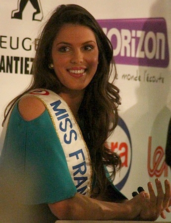 Miss France 2016, Iris Mittenaere en 2016